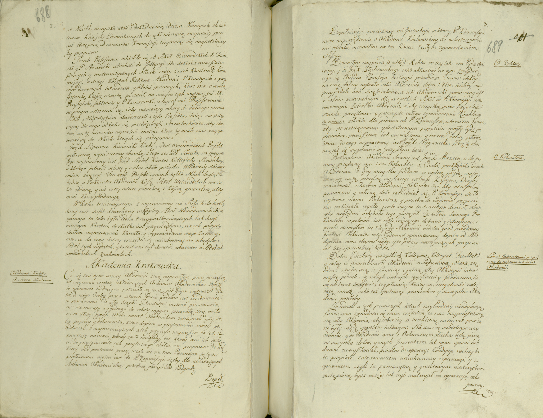 Instrukcja Hugona Kołłątaja